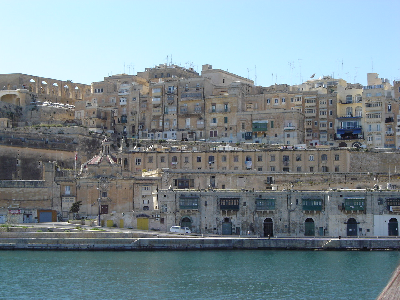 海から眺めた市街.